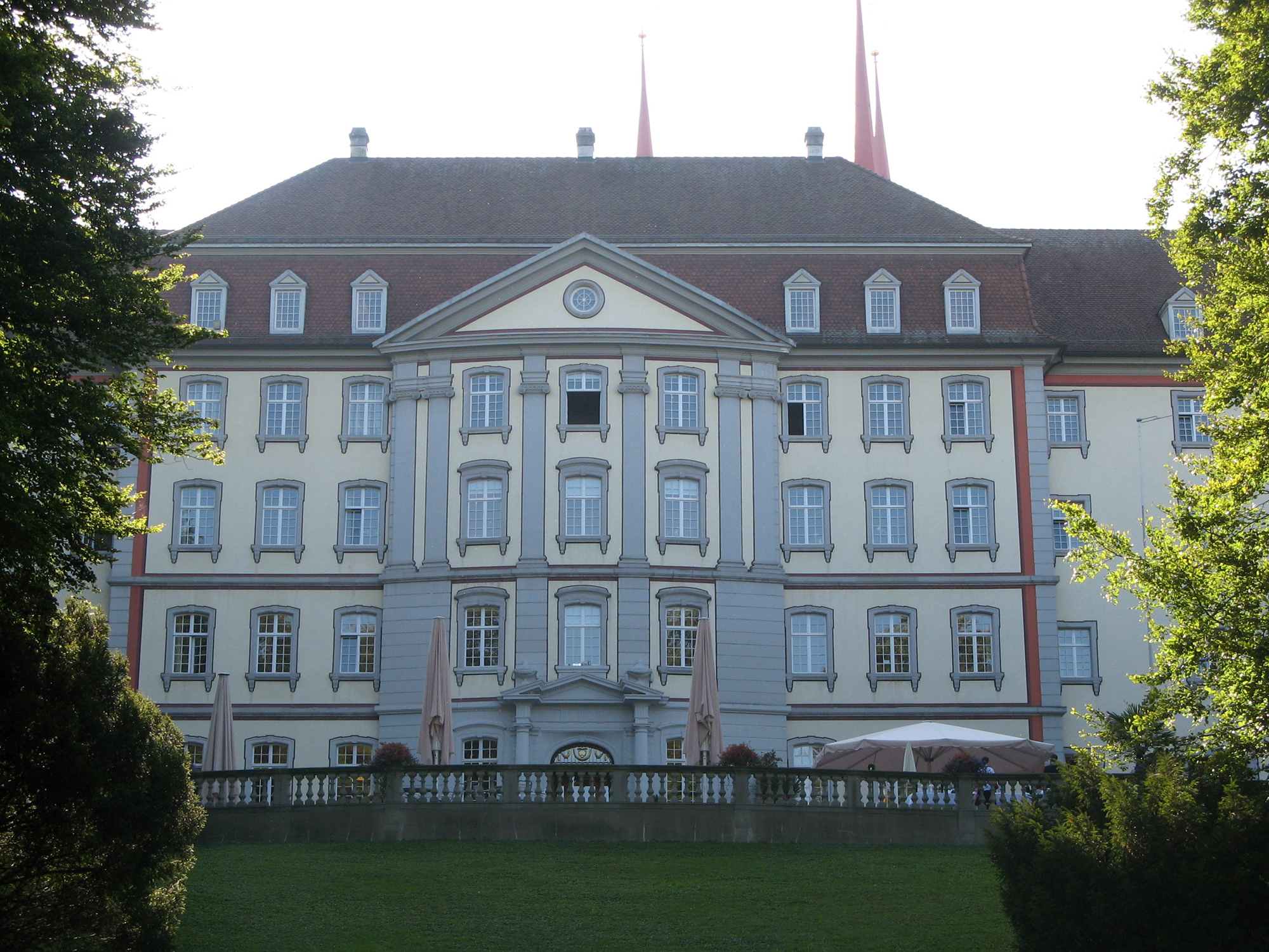 Ostflügel des Klosters Muri